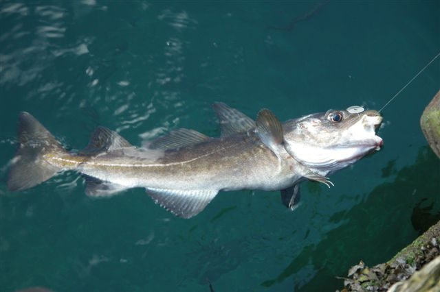 linefiskeri på Færøerne